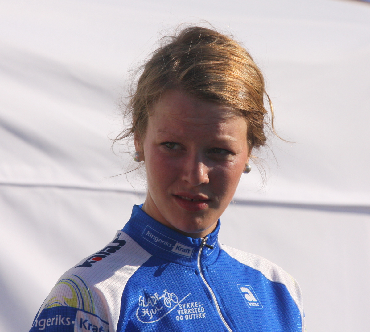 Marie Voreland , norsk syklist